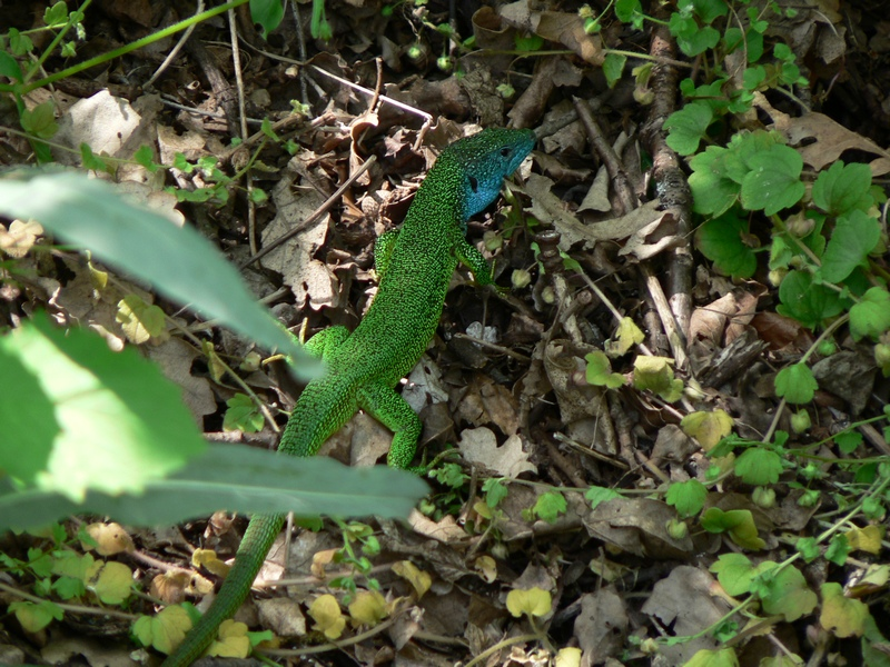 Lacerta viridis